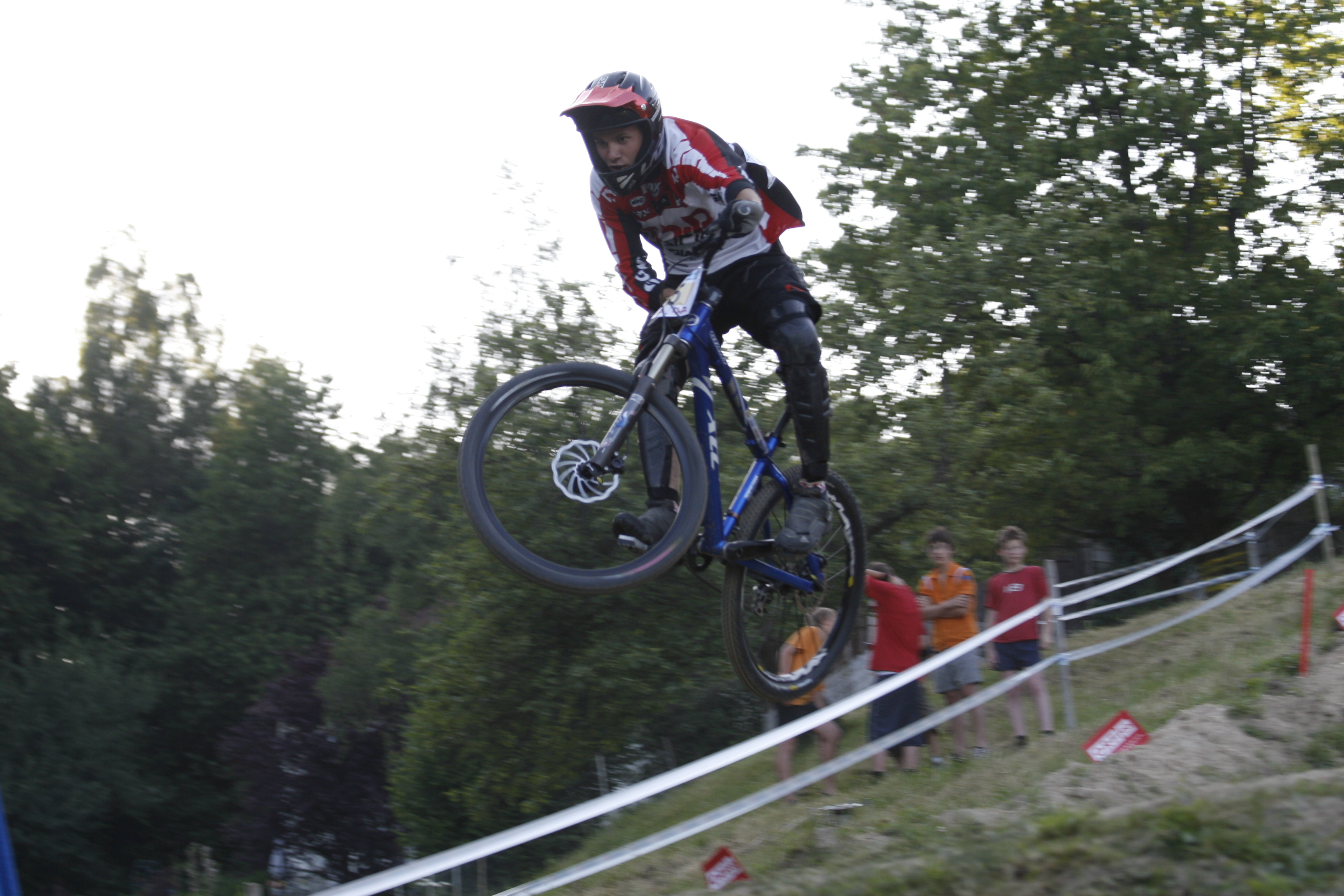 4-Cross-Mountainbiker